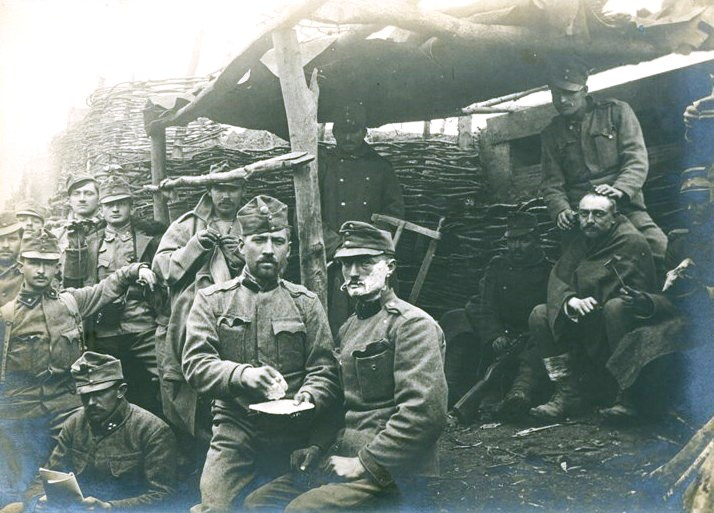 Снимка на австро-унгарски войници на обедно занимание в окопите по време на почивка.